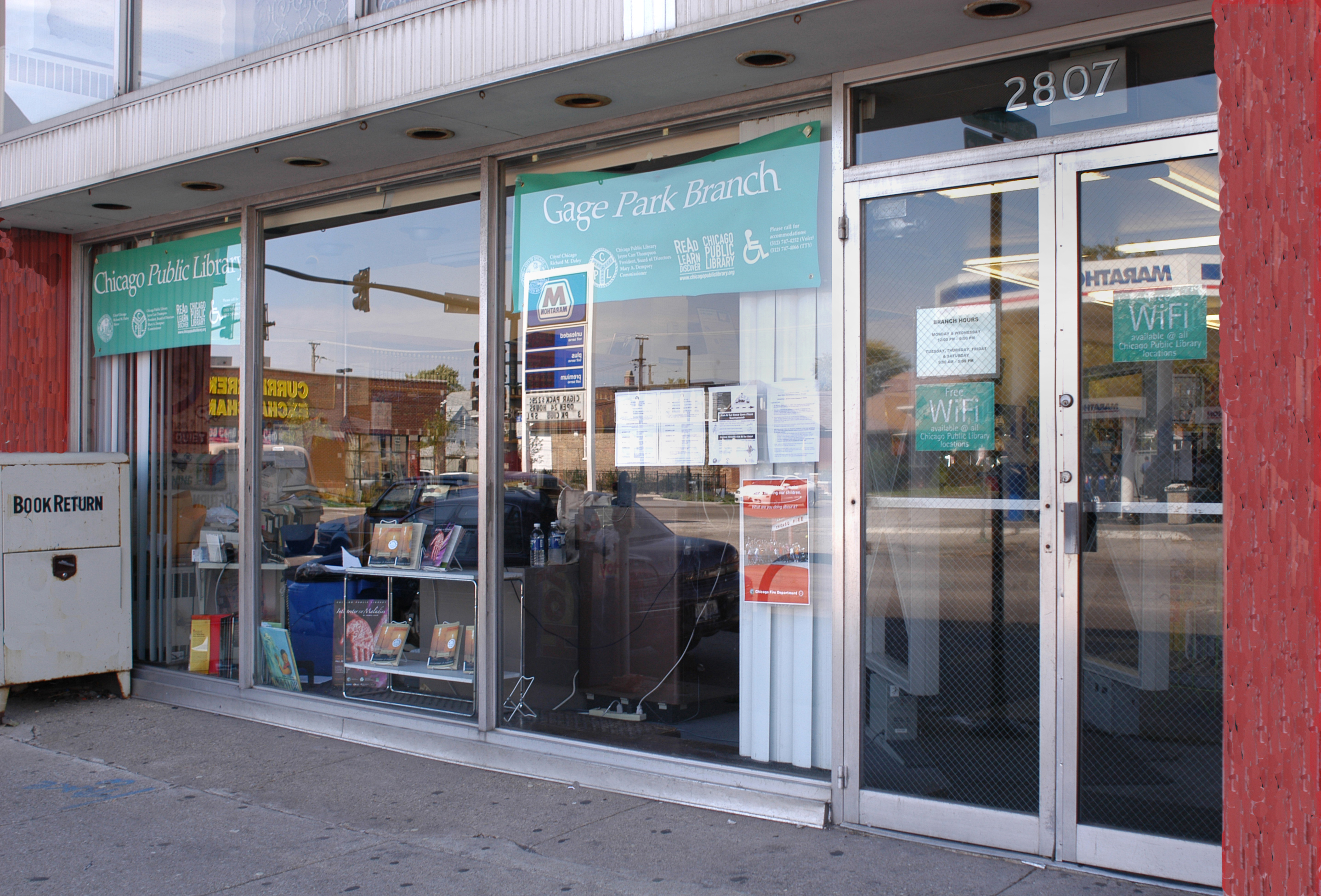 Gage Park